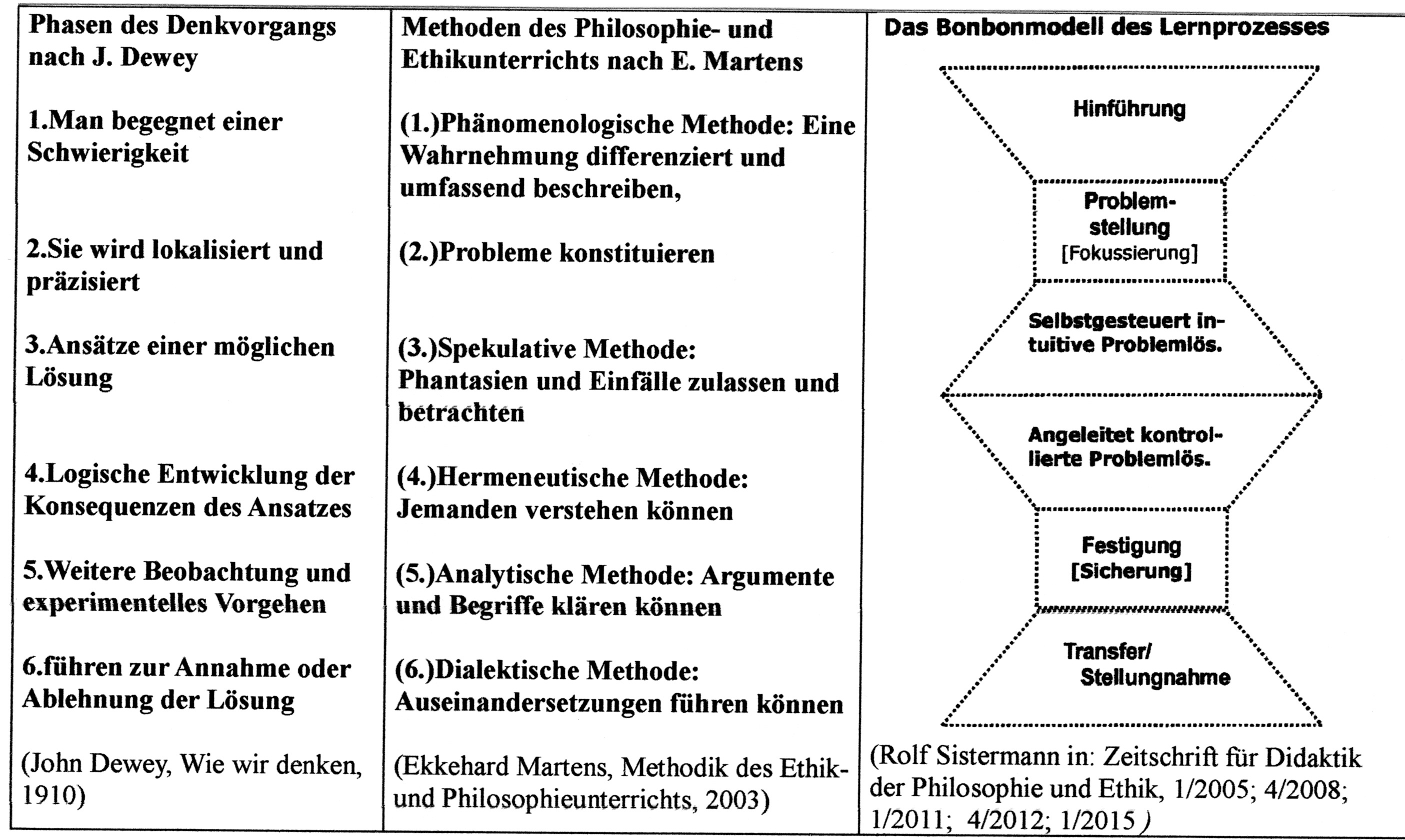 Das Bonbonmodell nach R. Sistermann im Vergleich zu den Stufen des Denkens nach J. Dewey und den Methoden nach E. Martens